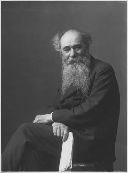 Ritratto del pittore Giuseppe Mentessi (1857-1931). Fotografia del 1922-1927